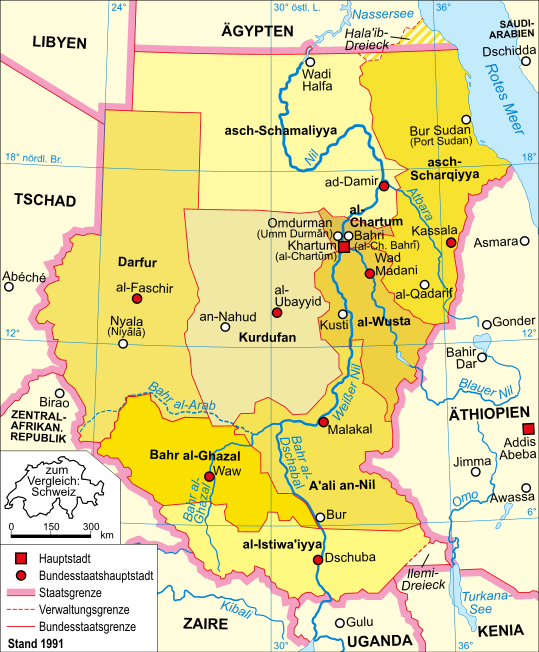 politische Karte des Sudan (Stand 1991)